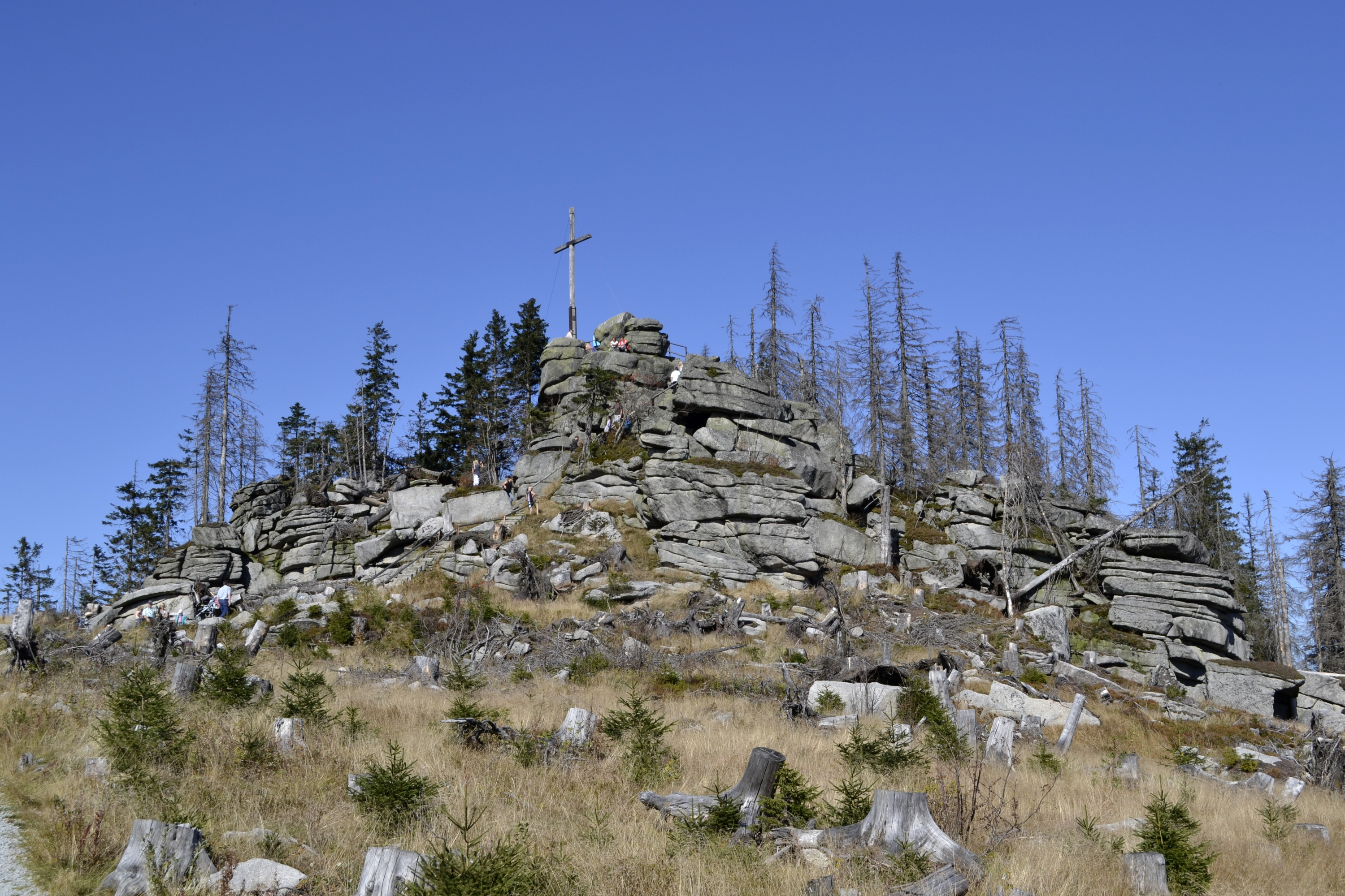 Der Hochstein auf dem Dreisesselberg.